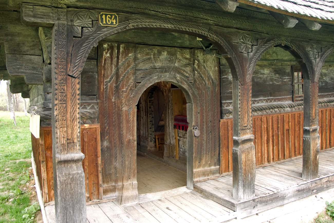 Sârbi, Sălaj: biserica de lemn, intrarea pe latura de sud.